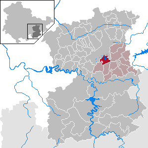 Plothen in Thuringia - Saale-Orla-Kreis